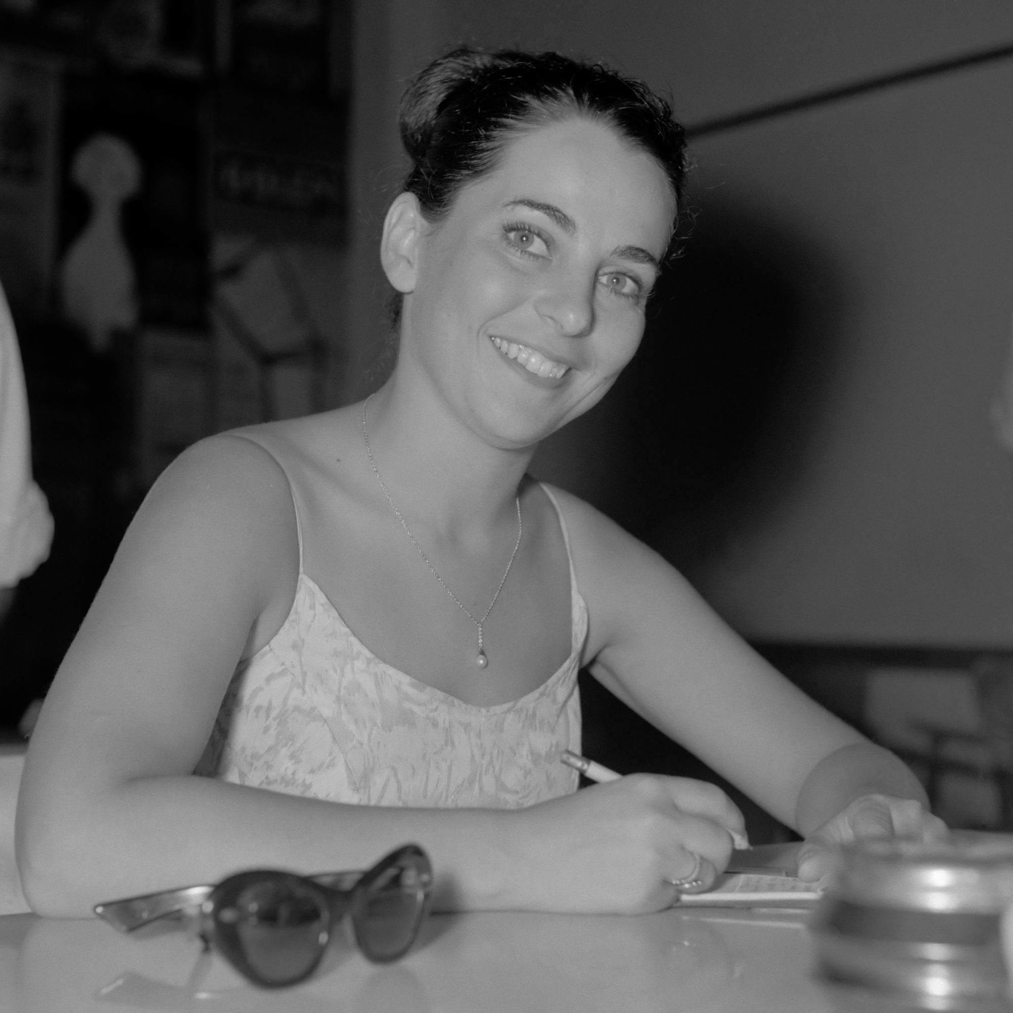 Portret van de actrice Dina Doron van het toneelgezelschap Habima in de kantine tijdens een repetitie.